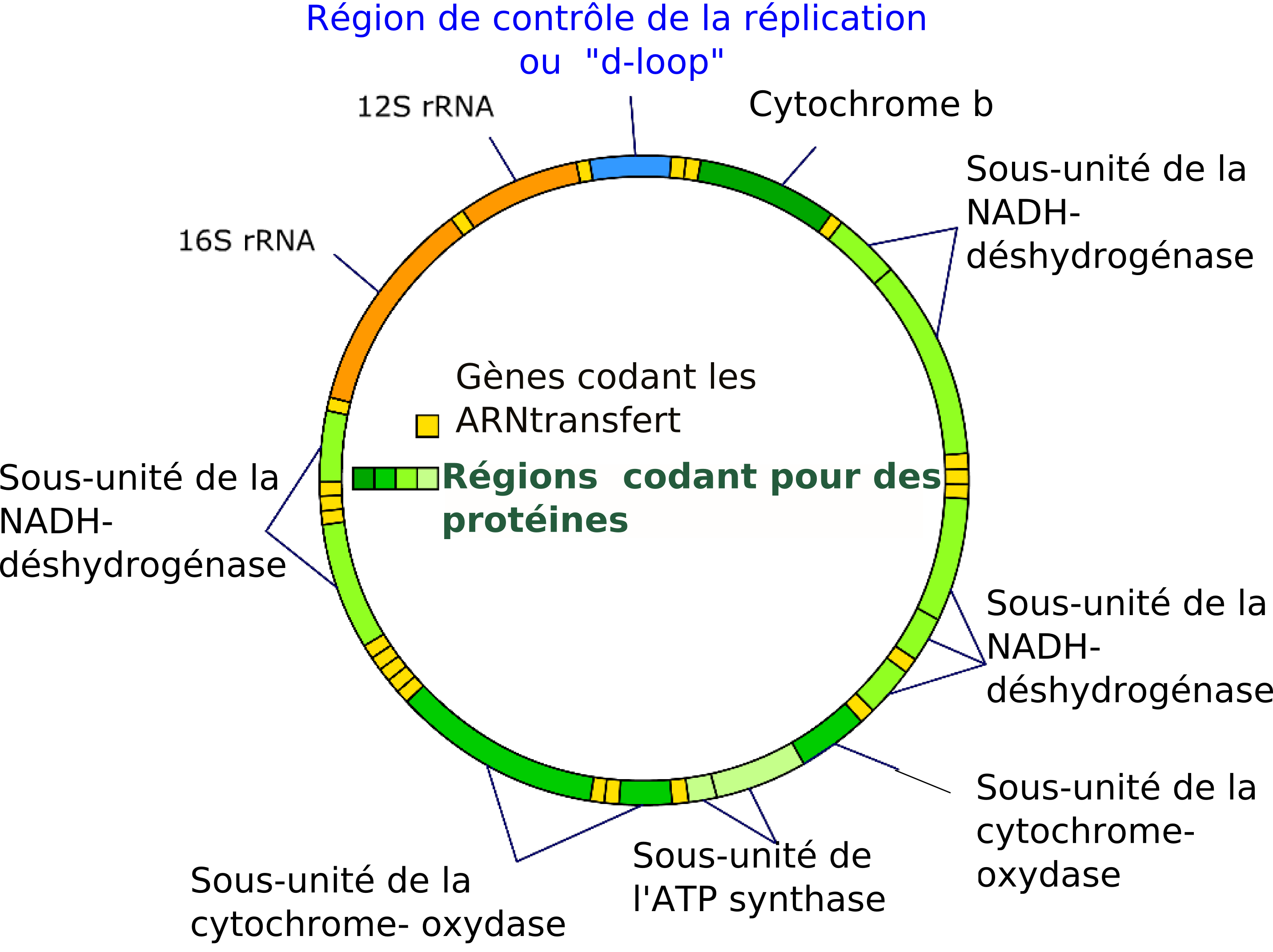 ADN_mitochondrial